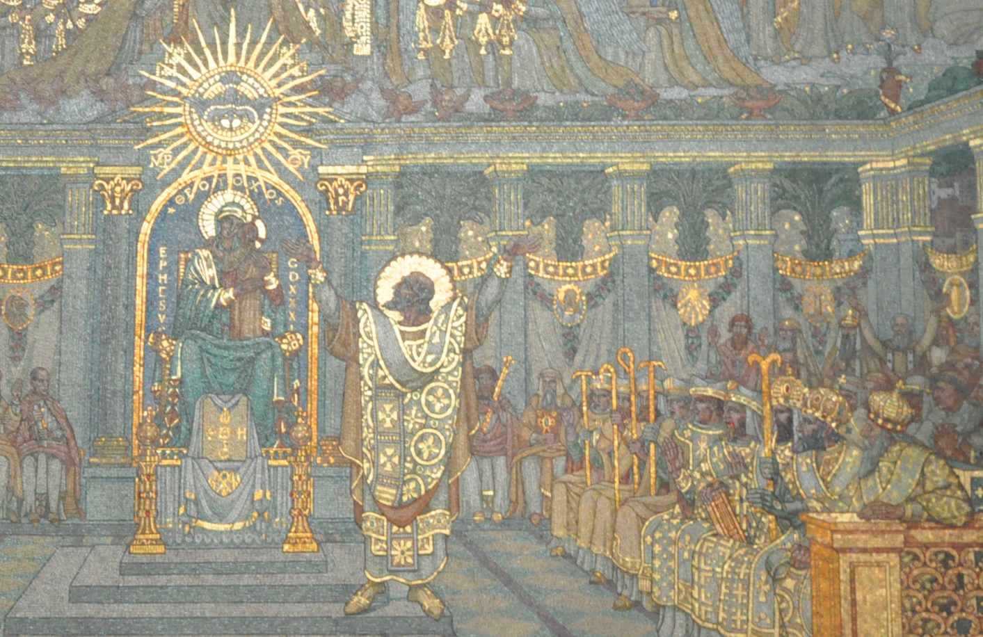 Dértail de la mosaïque de la basilique de Fourvière à Lyon (partie de droite)